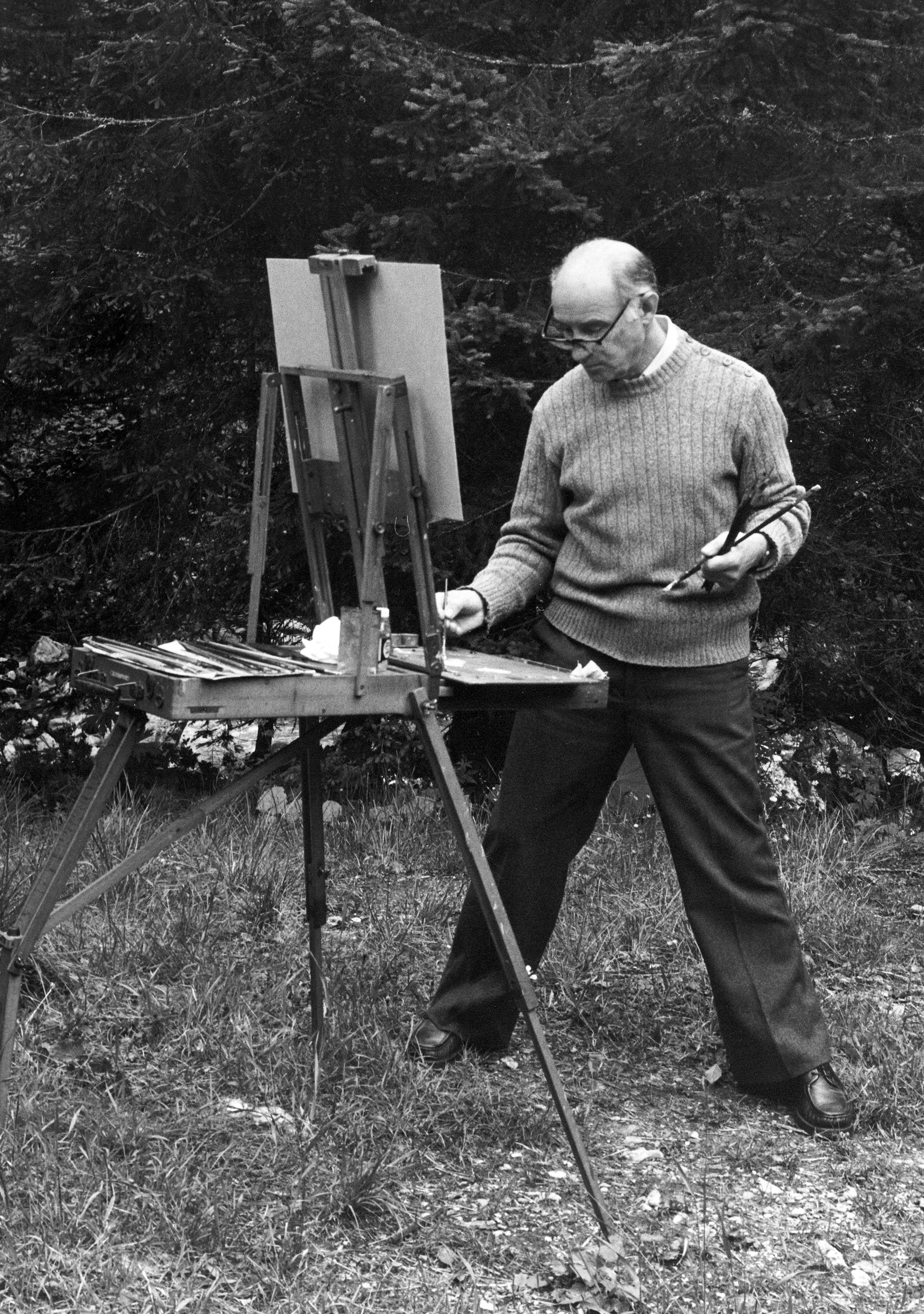 Foto di Danilo Soligo mentre dipinge all'aperto